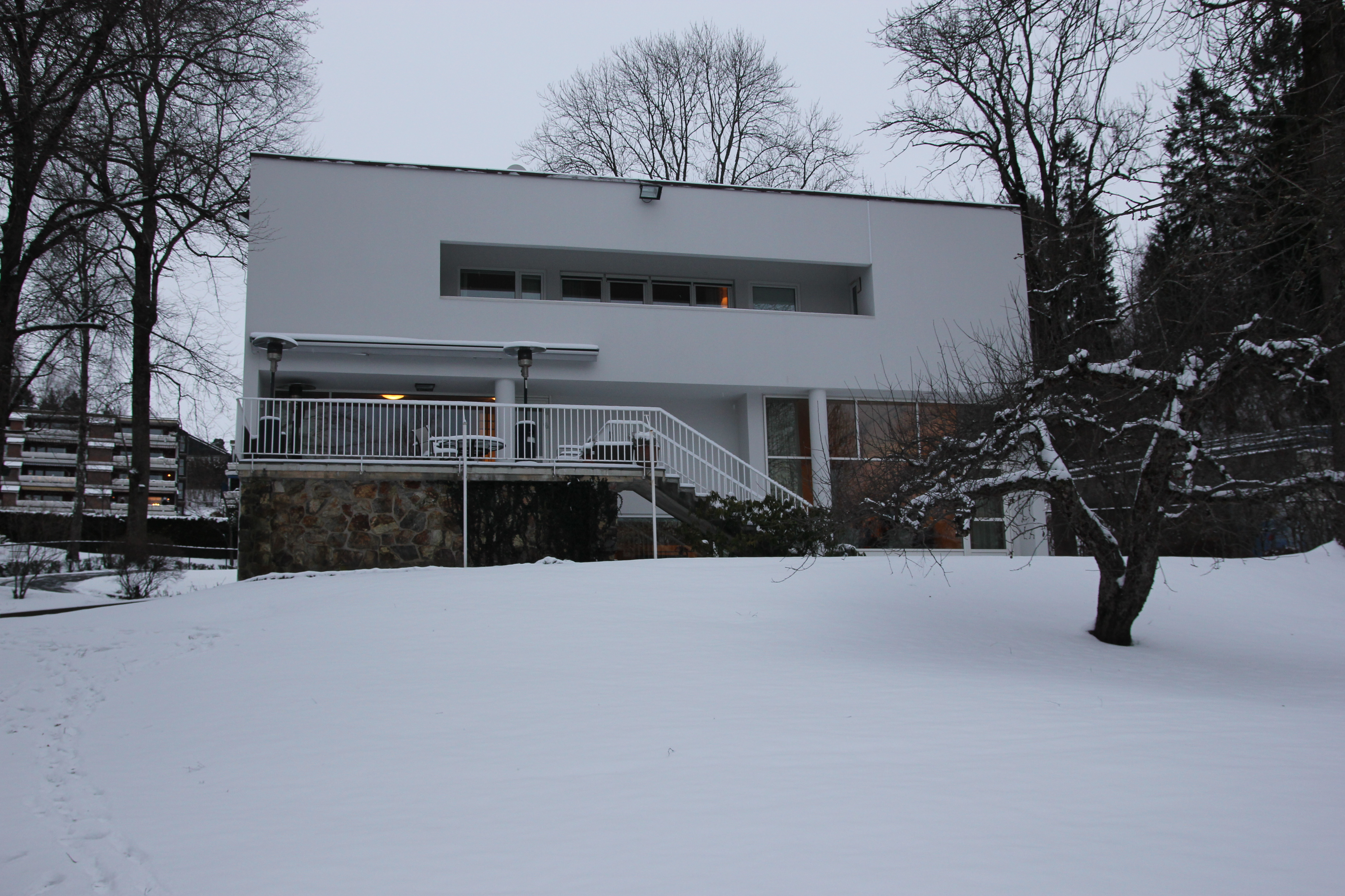 Villa Ditlev-Simonsen, fasade mot hage